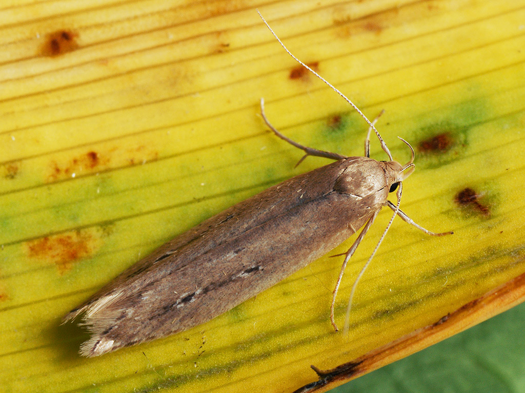 Exemplar found: Russia, Moscow Oblast, Odintsovsky District, near village Pestovo, 27.07.2017, by light МО, Одинцовский р-н, окрестности деревни Пестово, 27.07.2017, на свет